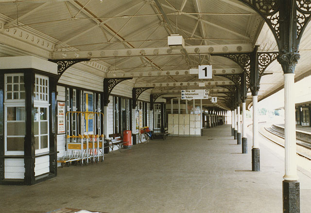 Aviemore station in 1988